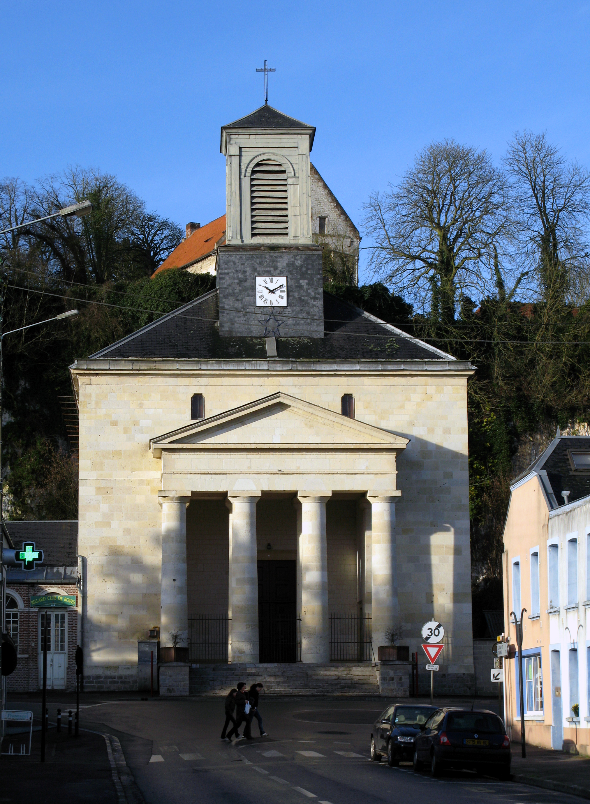 Boves (Somme, France) - L'église (vue de face). Elle se dresse juste dans l'axe de la rue principale (rue Victor Hugo), au pied de la falaise de craie au sommet de laquelle se trouvent (invisibles ici) le cimetière et les ruines du château fort.